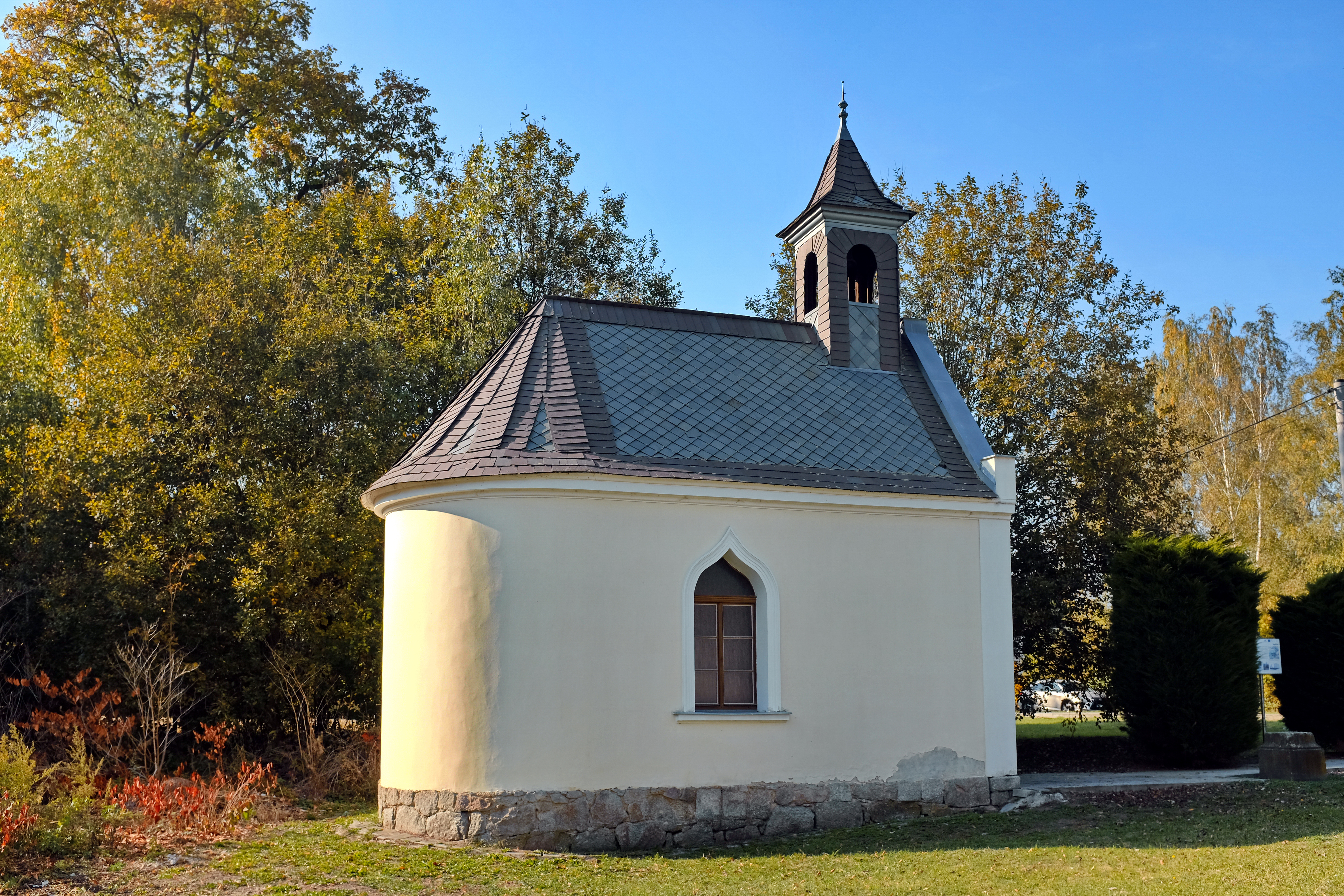 Kaple, Mírová.